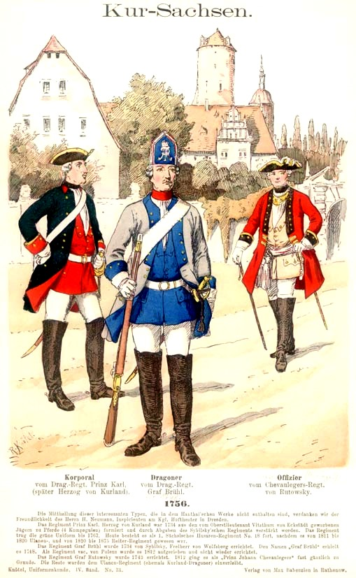 Sächsische Armee: Artillerie, Pioniere und Train und Beschriftung auf Grafik